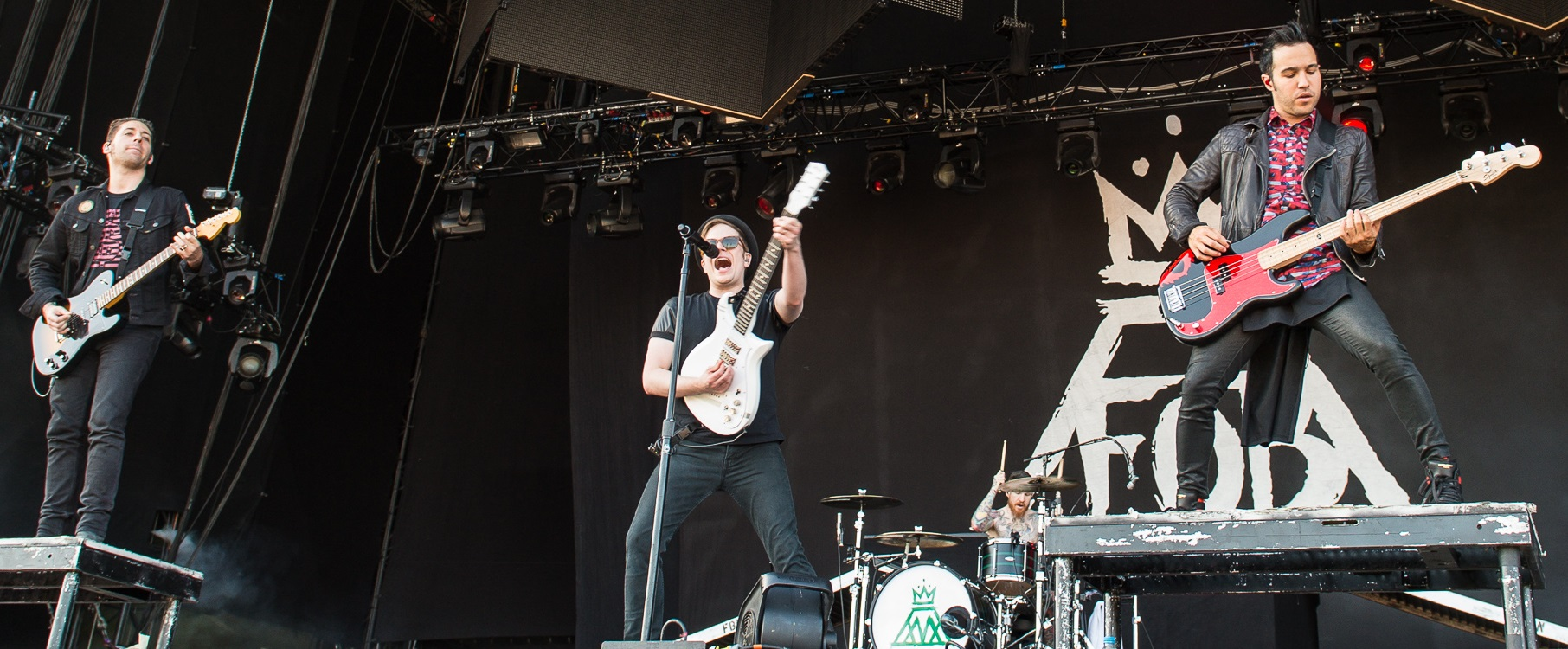 ARGO-Konzerte,Andy Hurley,Centerstage,Fall Out Boy,Joe Trohman,Konzert,Livekonzert,Livemusik,Musik,Patrick Stump,Pete Wentz,RiP,Rock im Park 2014